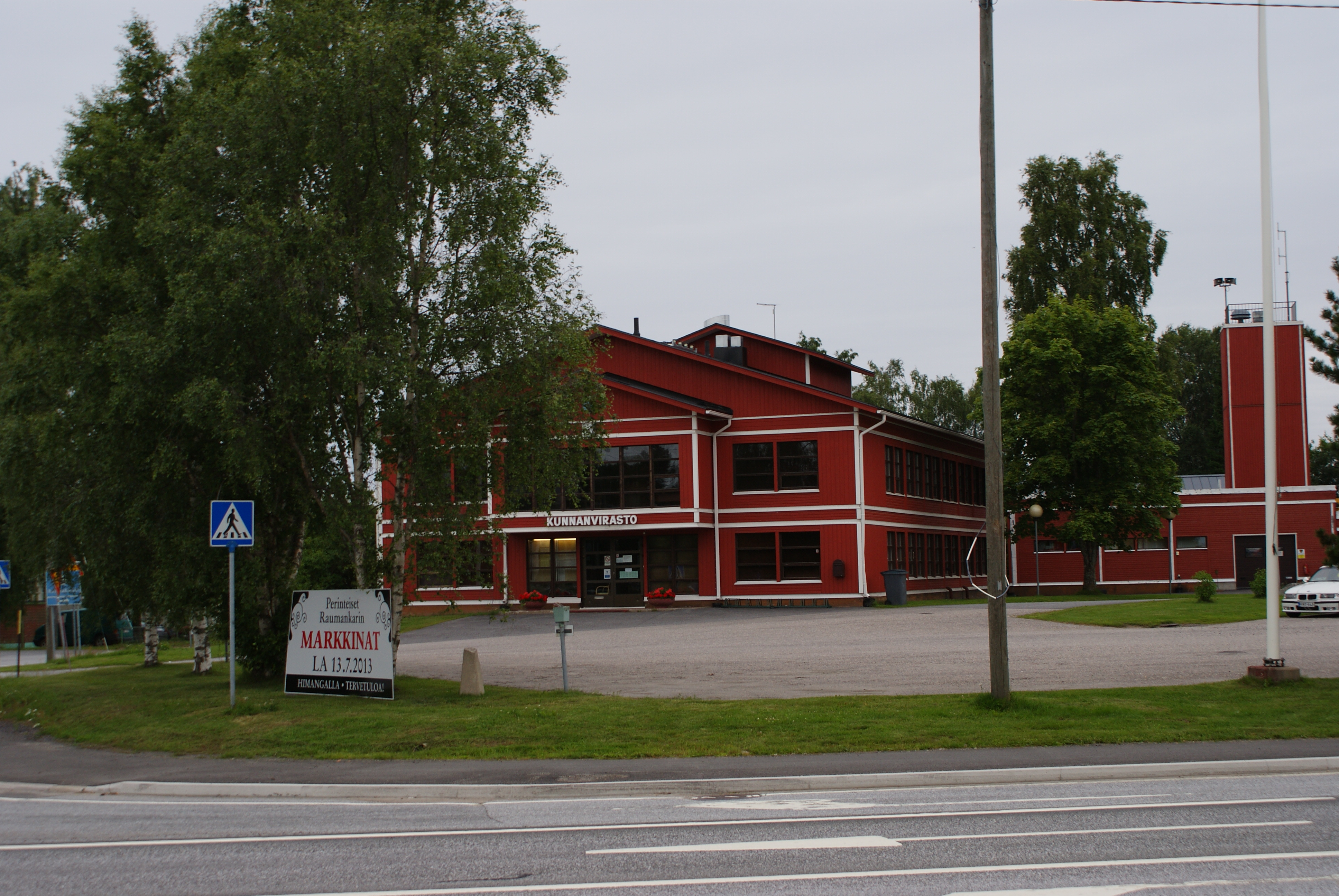 Kommunhuset i Himango.